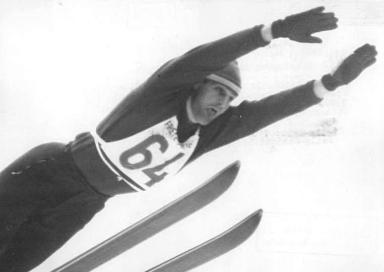 Zentralbild Gahlbeck 1.4.1963 Ahnert VIII. Pokalsprunglauf in Oberwiesenthal Der traditionelle Pokal-Sprunglauf der "Freien Presse" Karl-Marx-Stadt wurde am 31.3.1963 vor 6000 Zuschauern bei ungünstigen Schnee- und Witterungsverhältnissen ausgetragen. UBz: Weltmeister Helmut Recknagel (SC Motor Zella-Mehlis) belegte den 2. Platz.